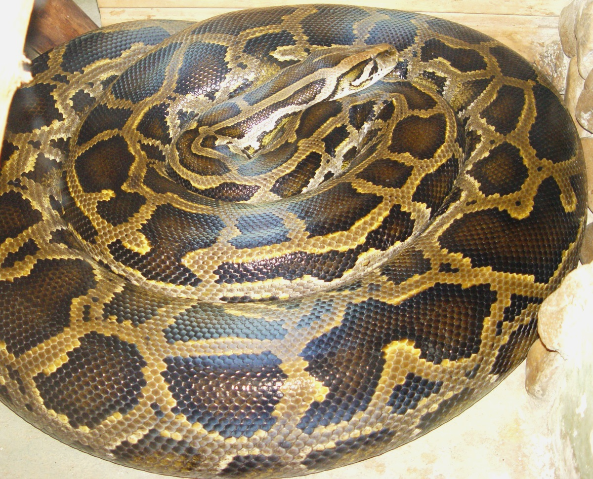 Burmese python (Python bivittatus) / Тигровый питон